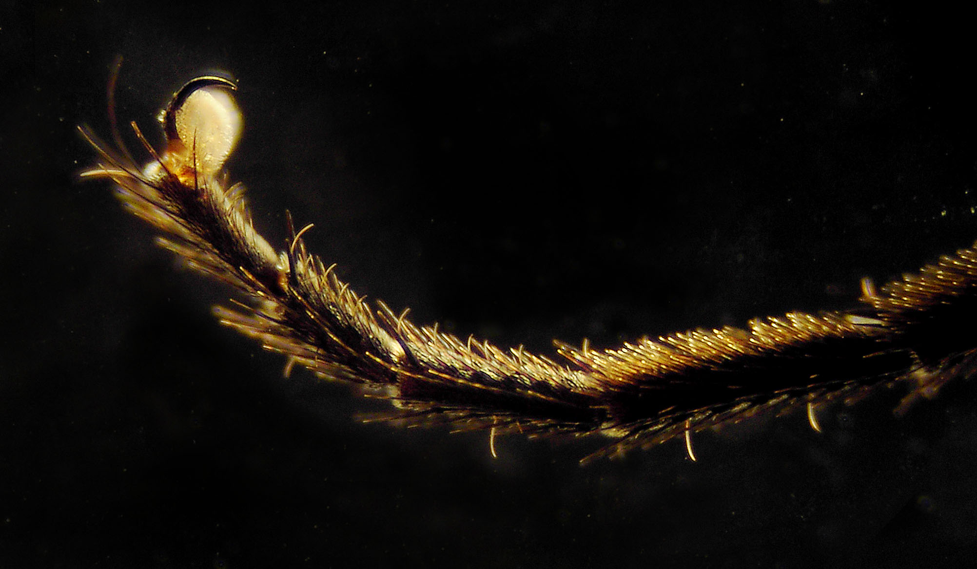 Fliegenbein 100 fach. Ausschnitt ca: 1500µm x 1000µm